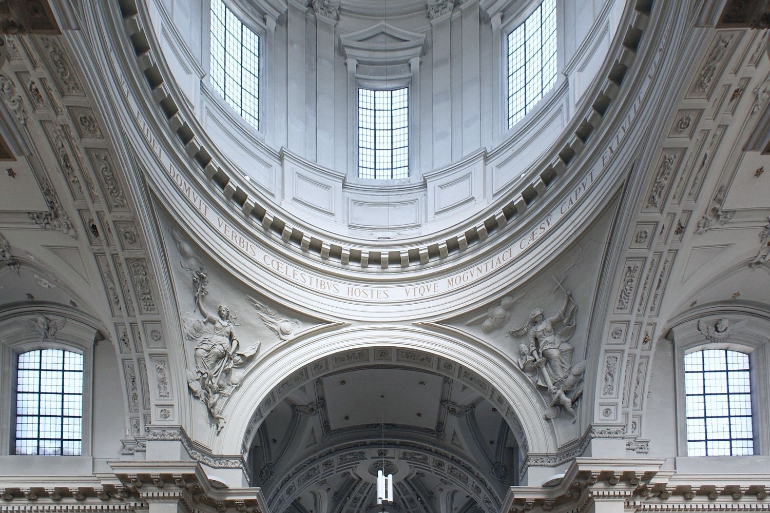 Cathédrale de St-Aubain (Namur) - Tambour de la coupole soutenue par des piliers et des colonnes